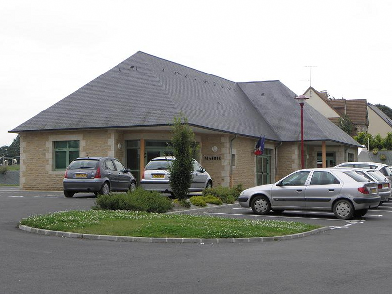 Mairie de Martigny (50).